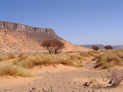 Désert Algérie